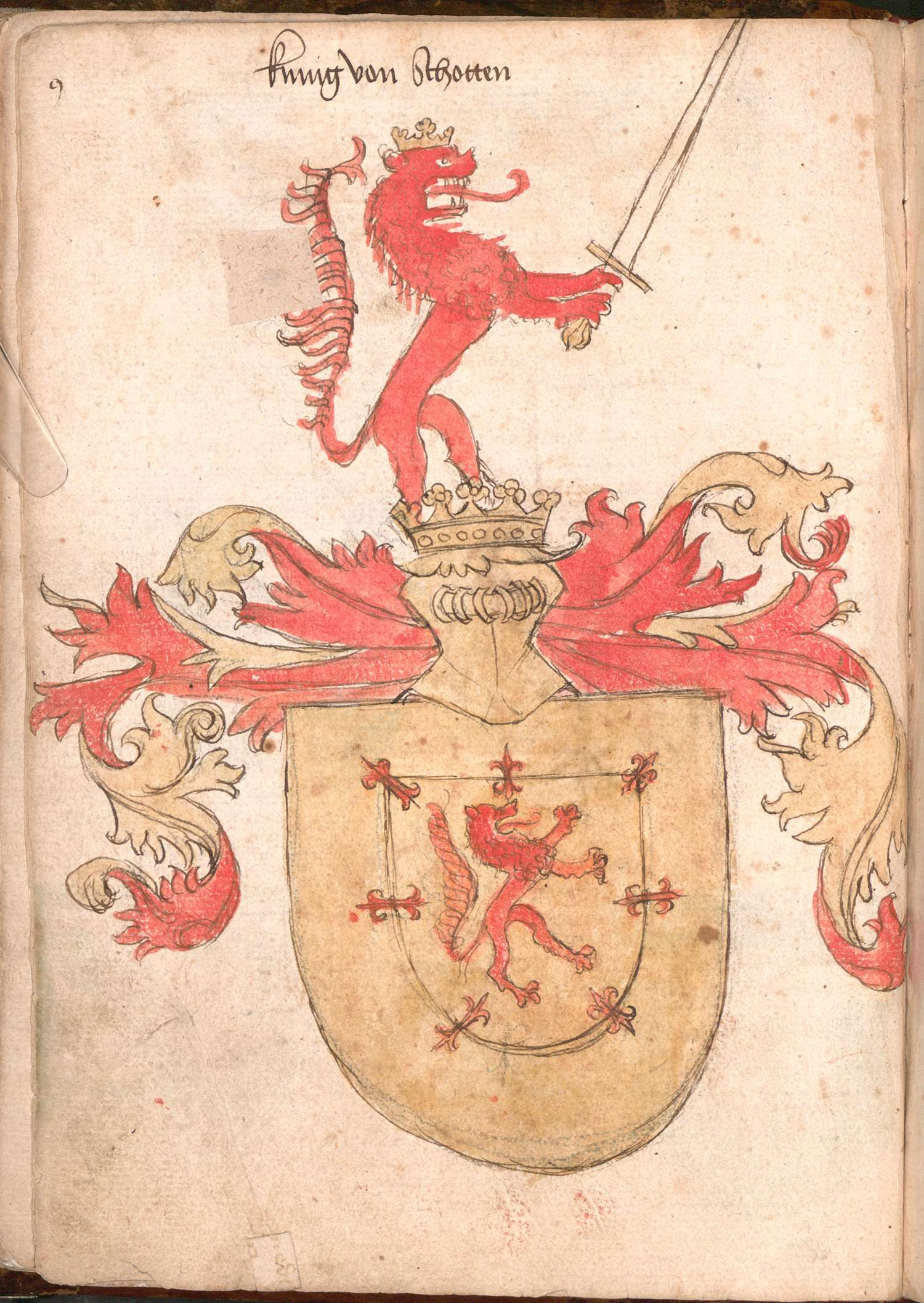 „Wernigeroder (Schaffhausensches) Wappenbuch“; Süddeutschland 4. Viertel 15. Jh.Bayerische Staatsbibliothek München, Cod.icon. 308 n Wappen König von Schottland